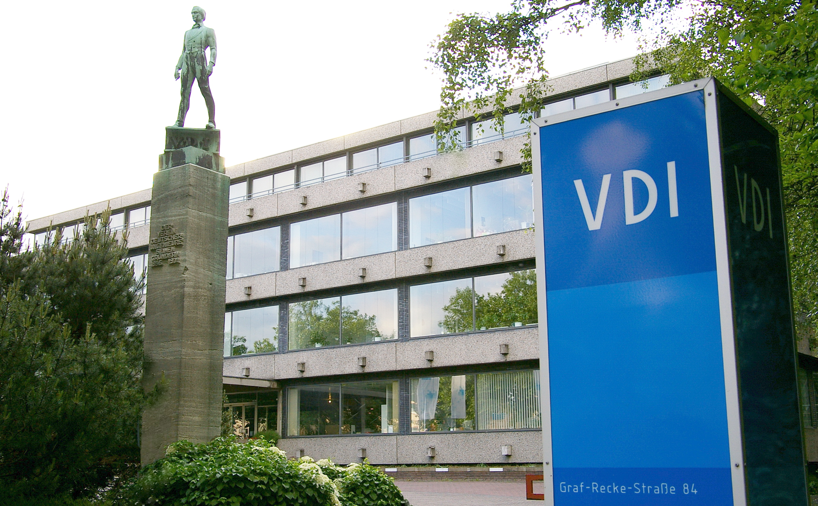 Haus des Verein Deutscher Ingenieure in Düsseldorf